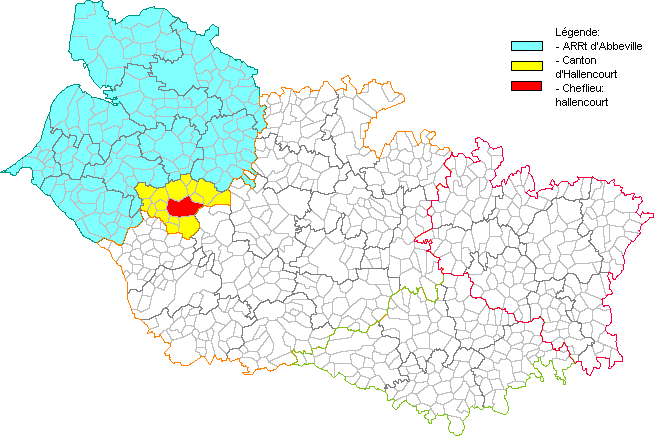 Carte géographique et administrative du canton d'Hallencourt (80 Somme- France)